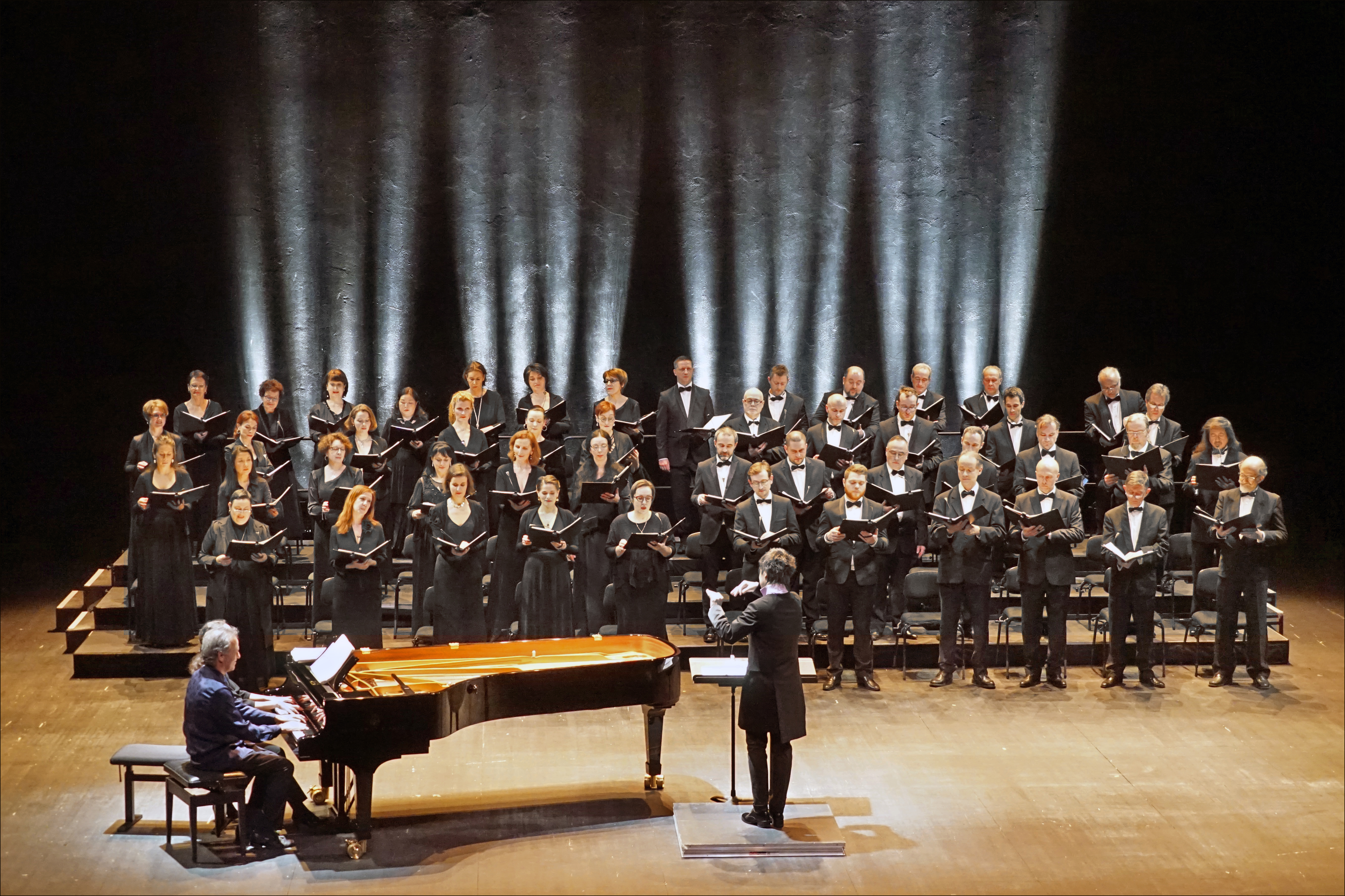 Le choeur de Radio France en concert sur la scène du grand théâtre des Gémeaux à Sceaux (scène nationale), une très belle soirée musicale sous la direction d'une nouvelle chèfe de choeur, d'origine slovène, qui succède à Sofi Jeannin et dont le style de conduite des choristes est très différent mais tout aussi raffiné. Directrice musicale Martina Batič Programme de musique romantique allemande : Mendelssohn, Brahms, Wolf, Schubert, Schumann Le site des Gémeaux à Sceaux Le site officiel du choeur de Radio France